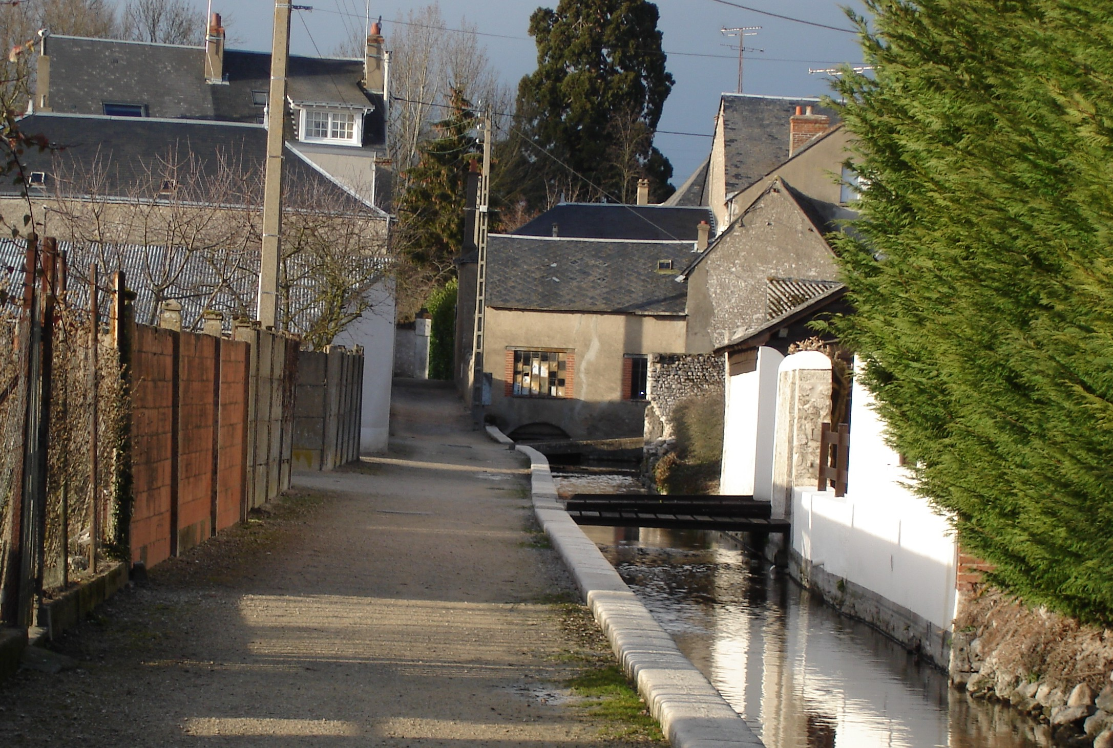 Tronne à Mer